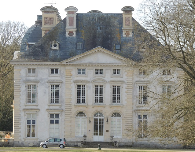 Château de Herces vu de la route avec sa dissymétrie, le fronton triangulaire de cette facade Nord et le dome sur plan carré de la facade Est à gauche. Grande pelouse au premier plan et arbre sans feuillage à droite